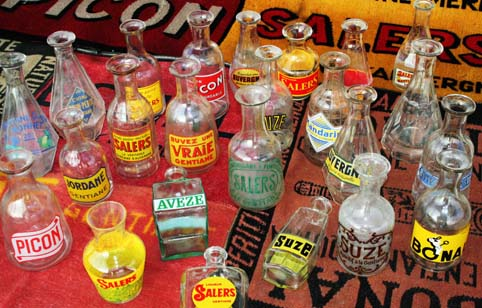 Description exposition de carafes de gentianes en 2006 Date2006SourceSelf-photographedAuthorcharlespierrePermission (Reusing this file) charlespierre exposition de carafes de gentianes en 2006